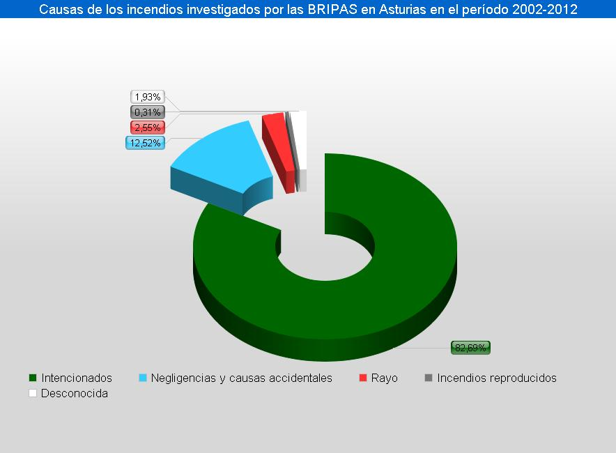 Causas de los incendios investigados por las BRIPAS en el Principado de Asturias en el período 2002-2012